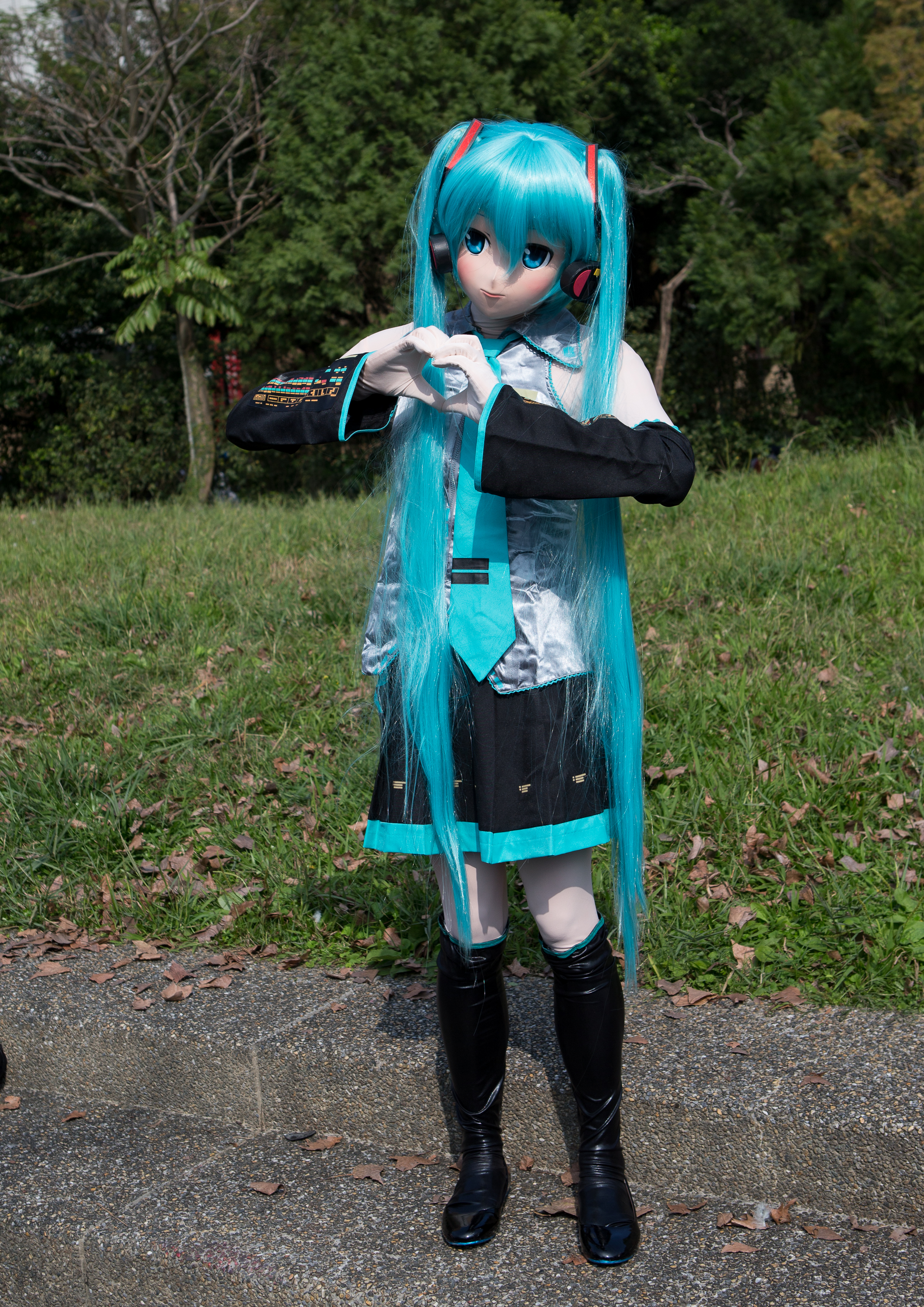 第39屆台灣同人誌販售會，布偶裝初音未來cosplayer。